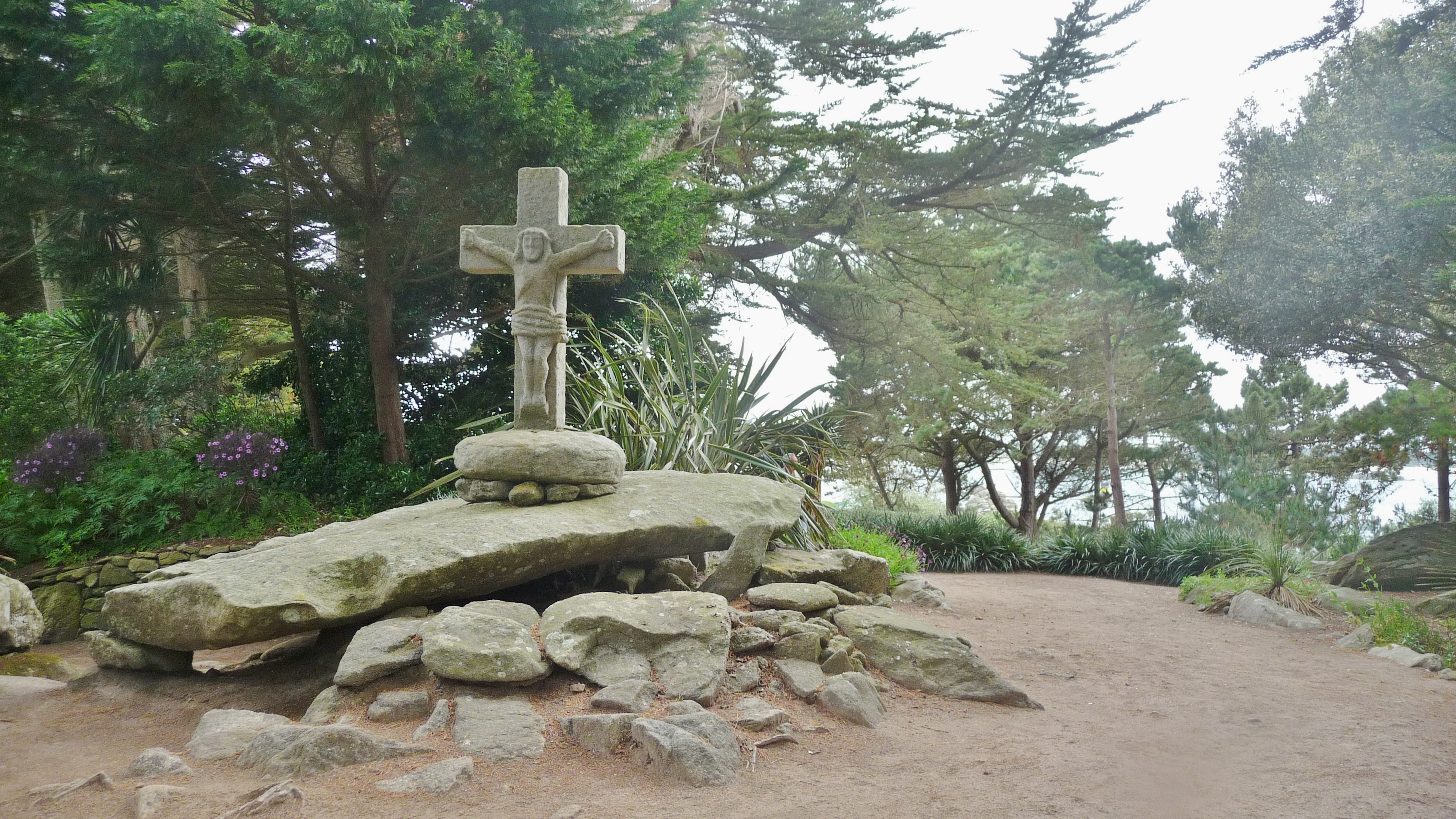 Île de Batz : jardin Georges Delaselle, le calvaire